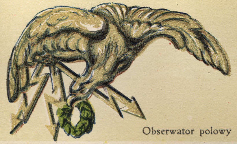 Odznaka Obserwator Polowy 1928.